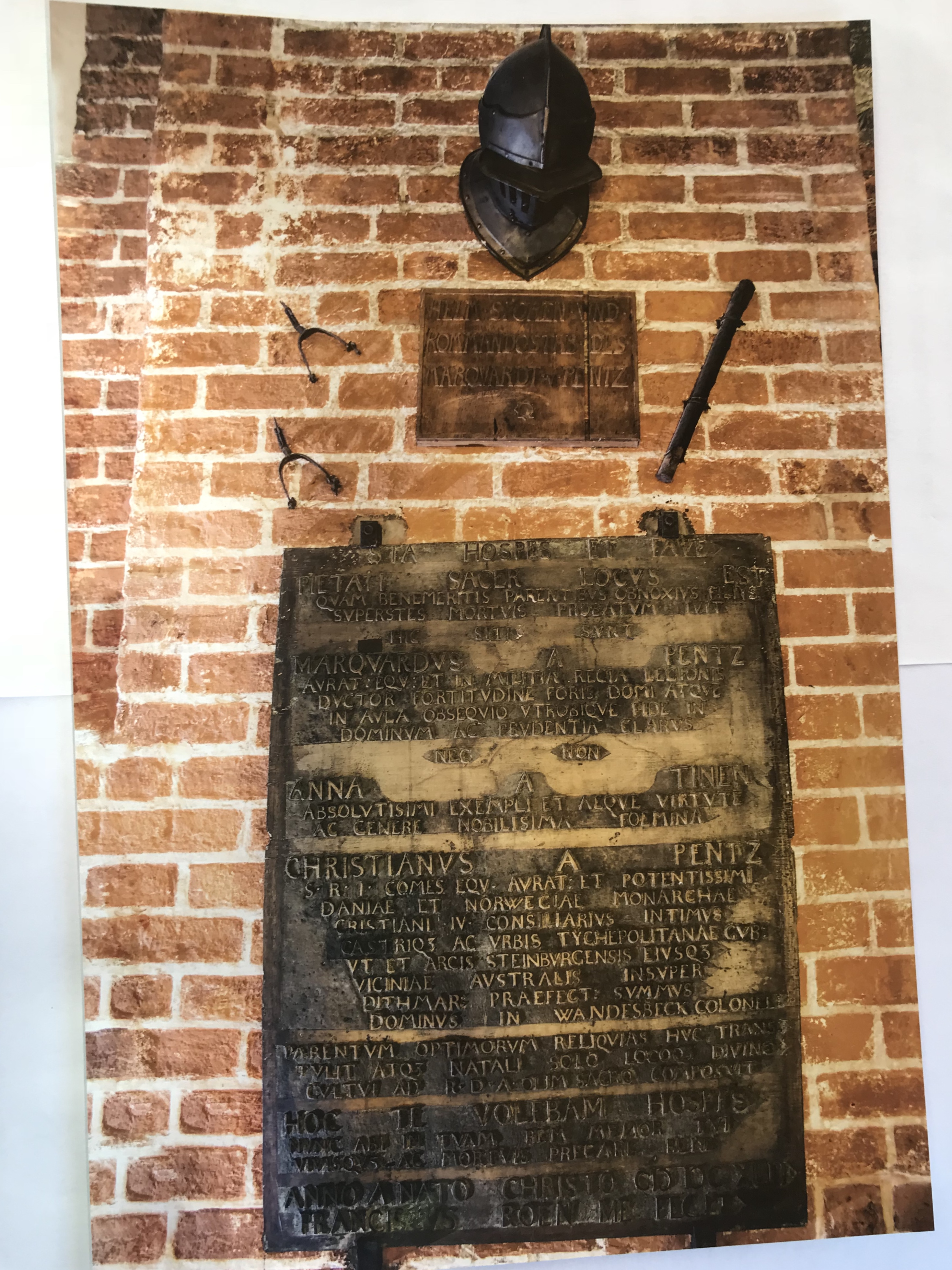 Die Gegenstände zeigen die Rückseite der linken vorderen Säule in der Marienkirche zu Bad Segeberg